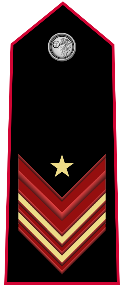 Controspallina per grado dell'Arma dei Carabinieri appuntato scelto qualifica speciale.